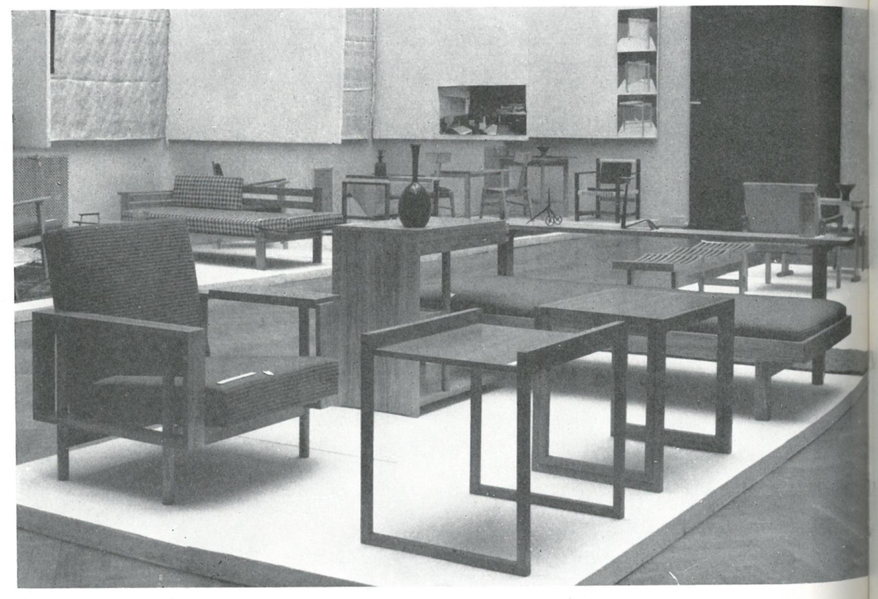 Spółdzielnia Artystów Plastyków "Ład", autorki i autorzy prac: Karolina Bułhakowa, Hanna Kiedrzyńska-Berbecka, Ewa Milewska, Andrzej Nehring, Izabela Szerska-Sternińska, Władysław Wincze. Źródło: "40 lat Ładu", Warszawa: Zachęta Centralne Biuro Wystaw Artystycznych 1967, s. 126